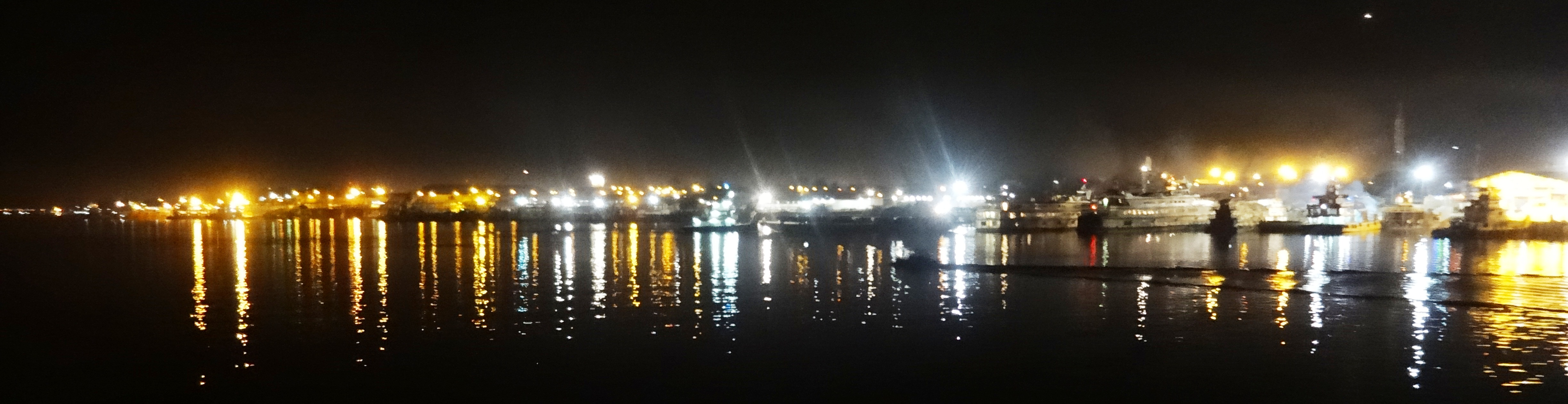 Horizonte nocturno de Iquitos